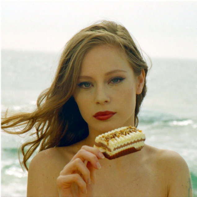 נינה ברוש (ויק) צולמה על ידי בשנת 1994